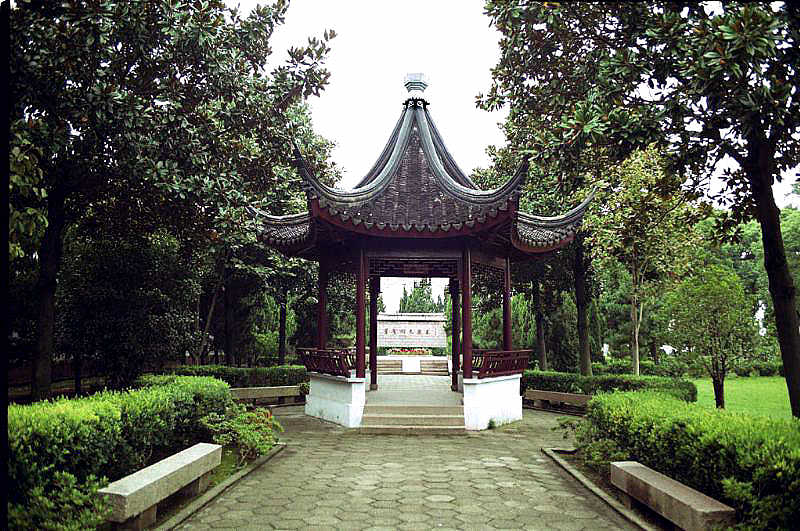 Ye Shengtao Tomb at Luzhi叶圣陶墓园